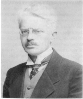 Carl Gustav Bunte, 1920, Professor für Gastechnik und Brennstoffverwendung